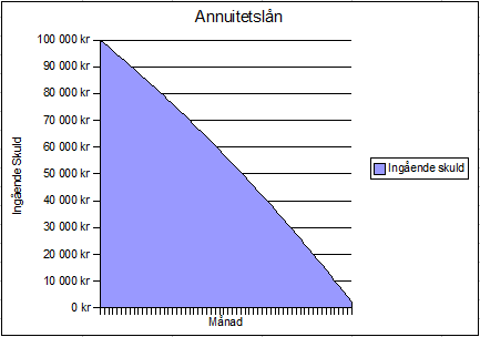 Swedish loan model (Annuitetslån): Kvarvarande Skuld